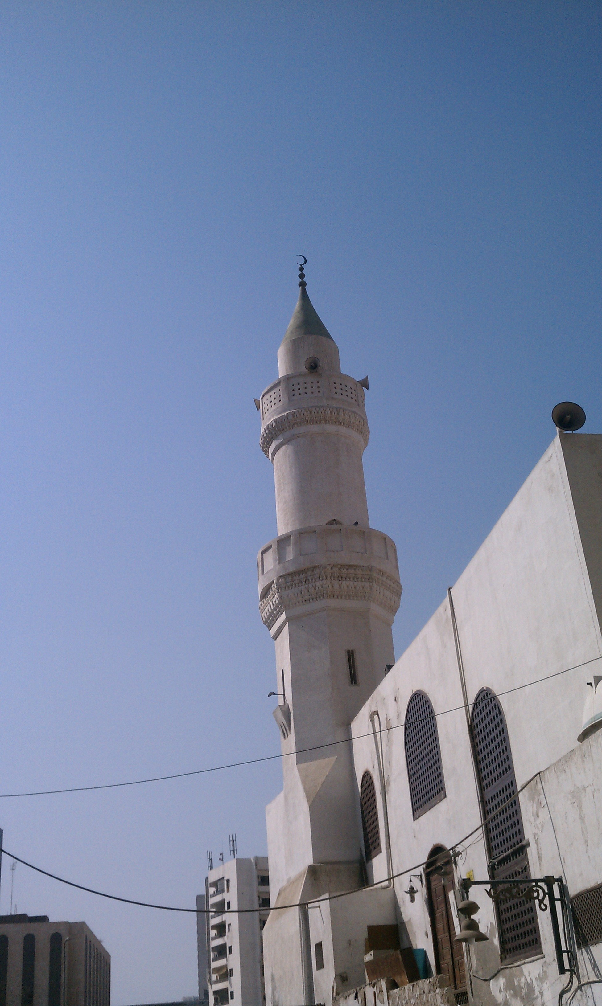 A mosque near a souk in Jeddah, Saudo Arabia